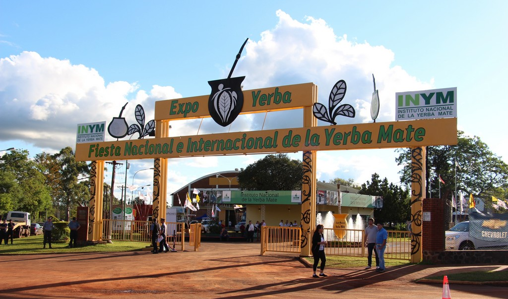 Fiesta Nacional de la Yerba Mate en la localidad de Apóstoles, Misiones, Argentina.